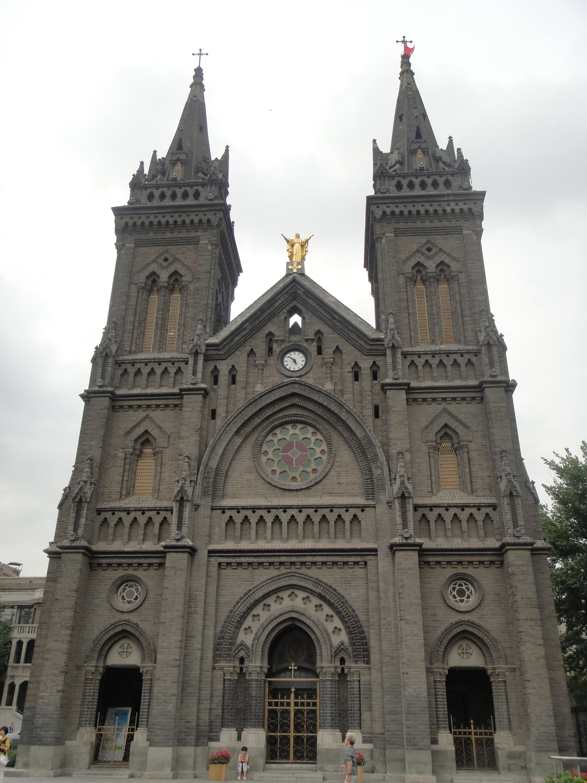 中文（中国大陆）: 耶稣圣心主教座堂